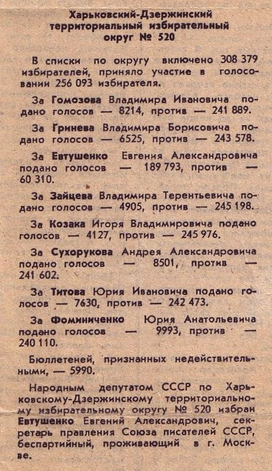 Евтушенко Евгений. Харьков. Официальные результаты выборов народного депутата (одного) в Верховный Совет СССР по Дзержинскому территориальному округу 14 мая 1989 года. Огромный отрыв - в 19 раз больше голосов, чем ближайший кандидат.